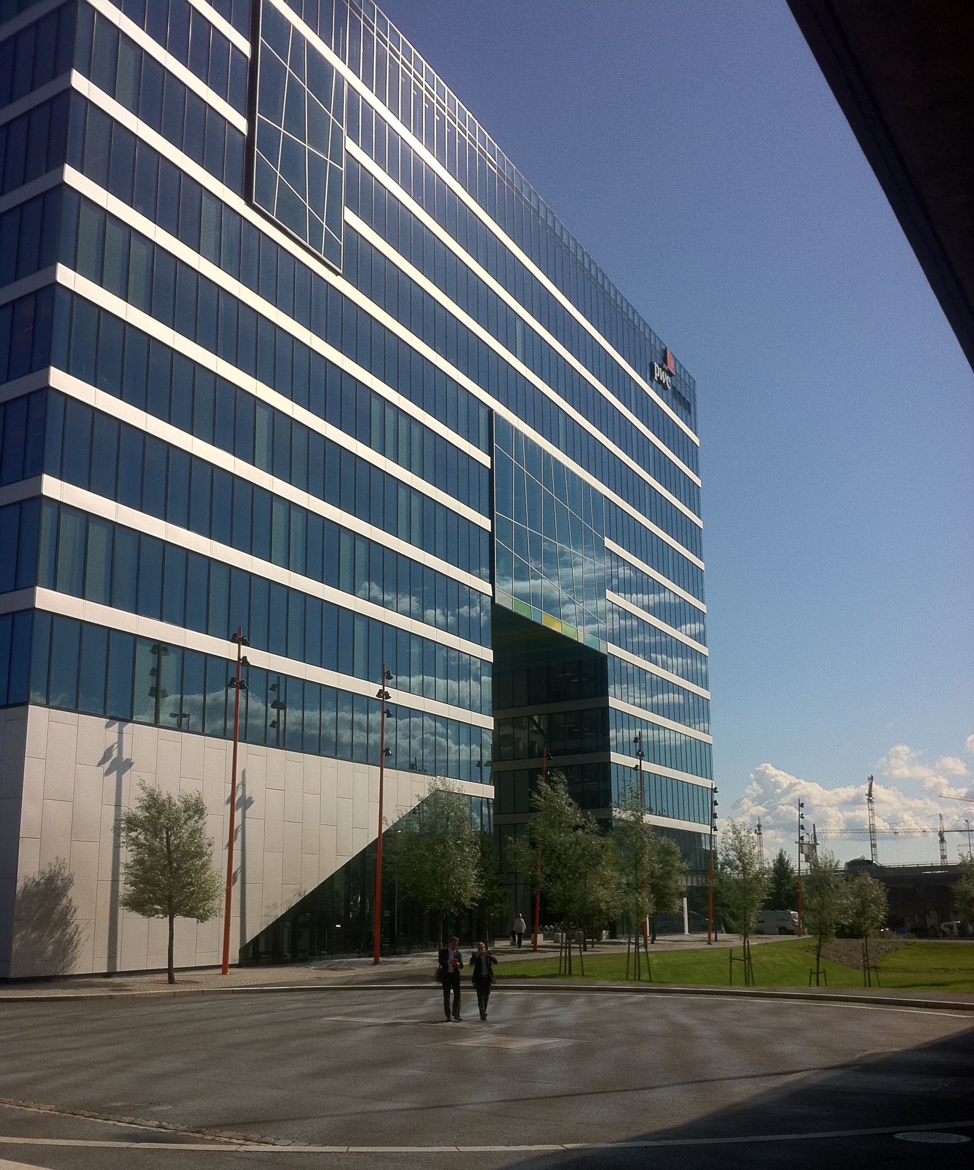 Kontorbygg i Bjørvika, Oslo